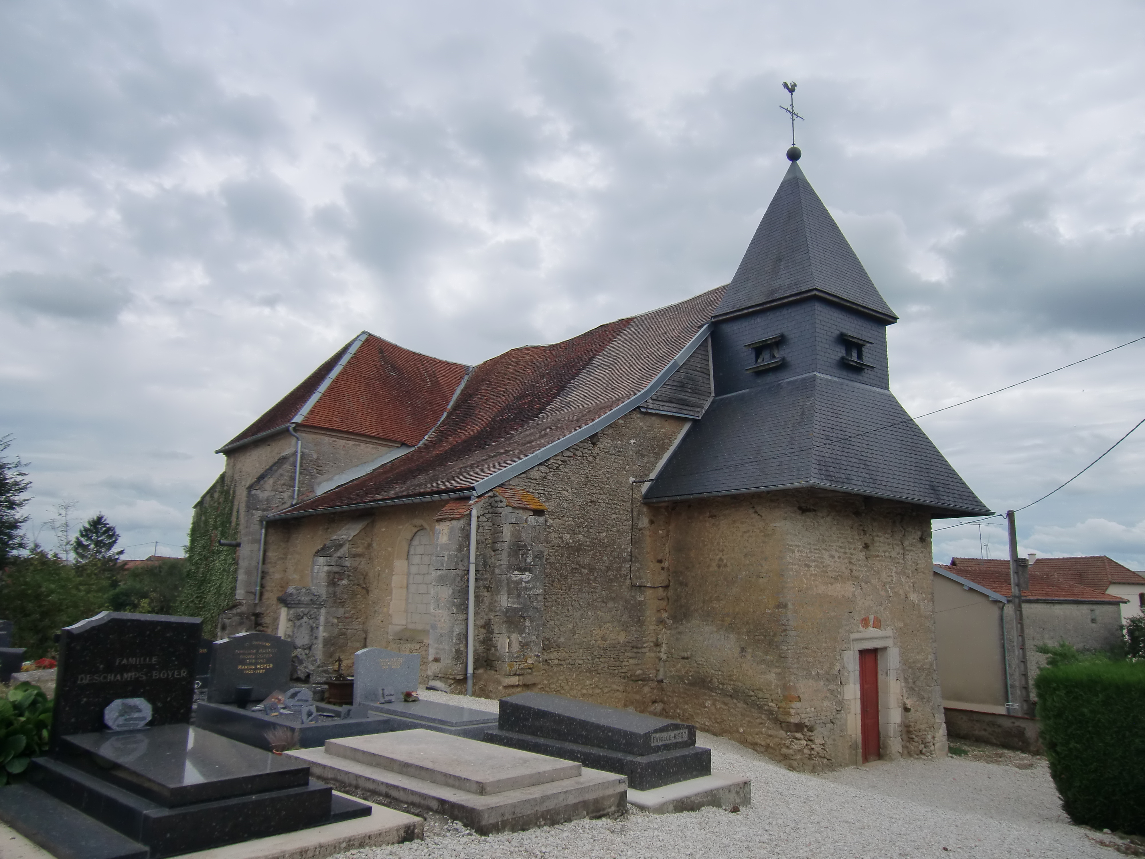 église de Vernonvilliers (Aube - Champagne - France)